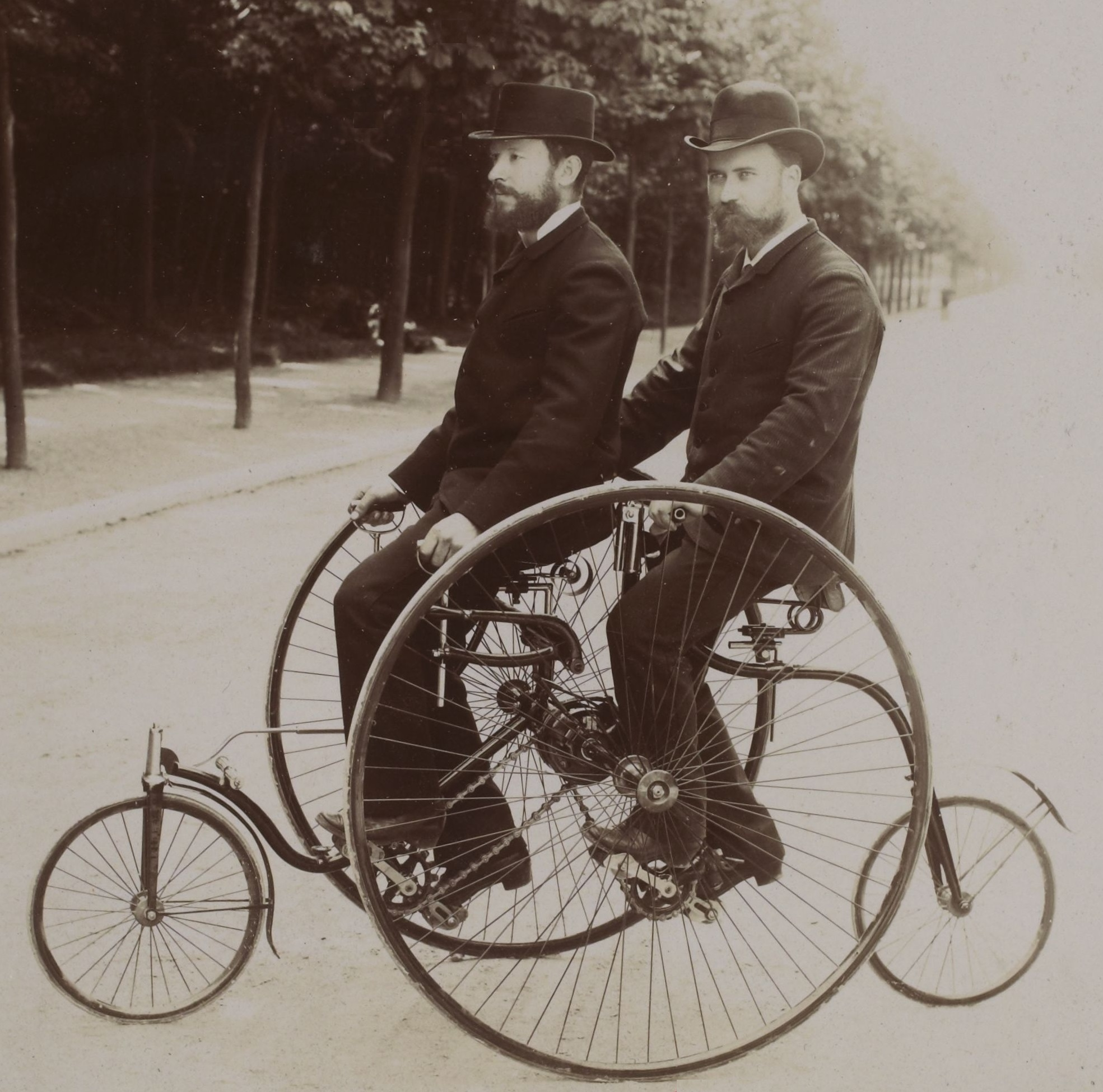 [Collection Jules Beau. Photographie sportive] : T. 1. Années 1894 et 1895 / Jules Beau : F. 13. Clement